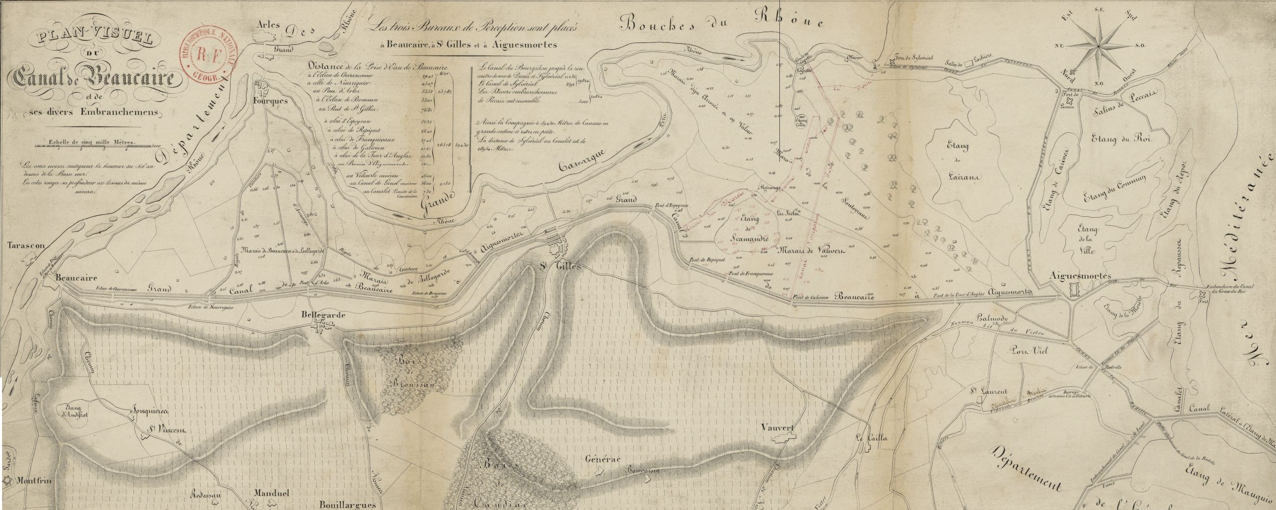 Titre : Plan visuel du canal de Beaucaire et de ses divers embranchements Éditeur : impr. de Engelmann (Paris) Date d'édition : 18.. Sujet : France -- Canaux Type : document cartographique,carte,image fixe Langue : Français Format : 1 flle ; 65 x 28 cm Format : image/jpeg Droits : domaine public Identifiant : ark:/12148/btv1b84438908 Source : Bibliothèque nationale de France, GED-4865 Relation : Couverture : France Provenance : bnf.fr Date de mise en ligne : 25/07/2011